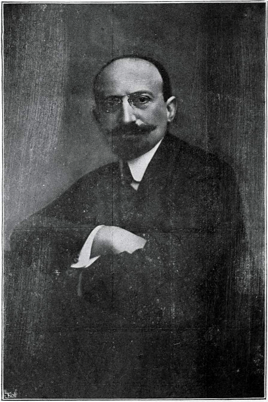 griechischer Politiker, 19.-20. Jahrhundert